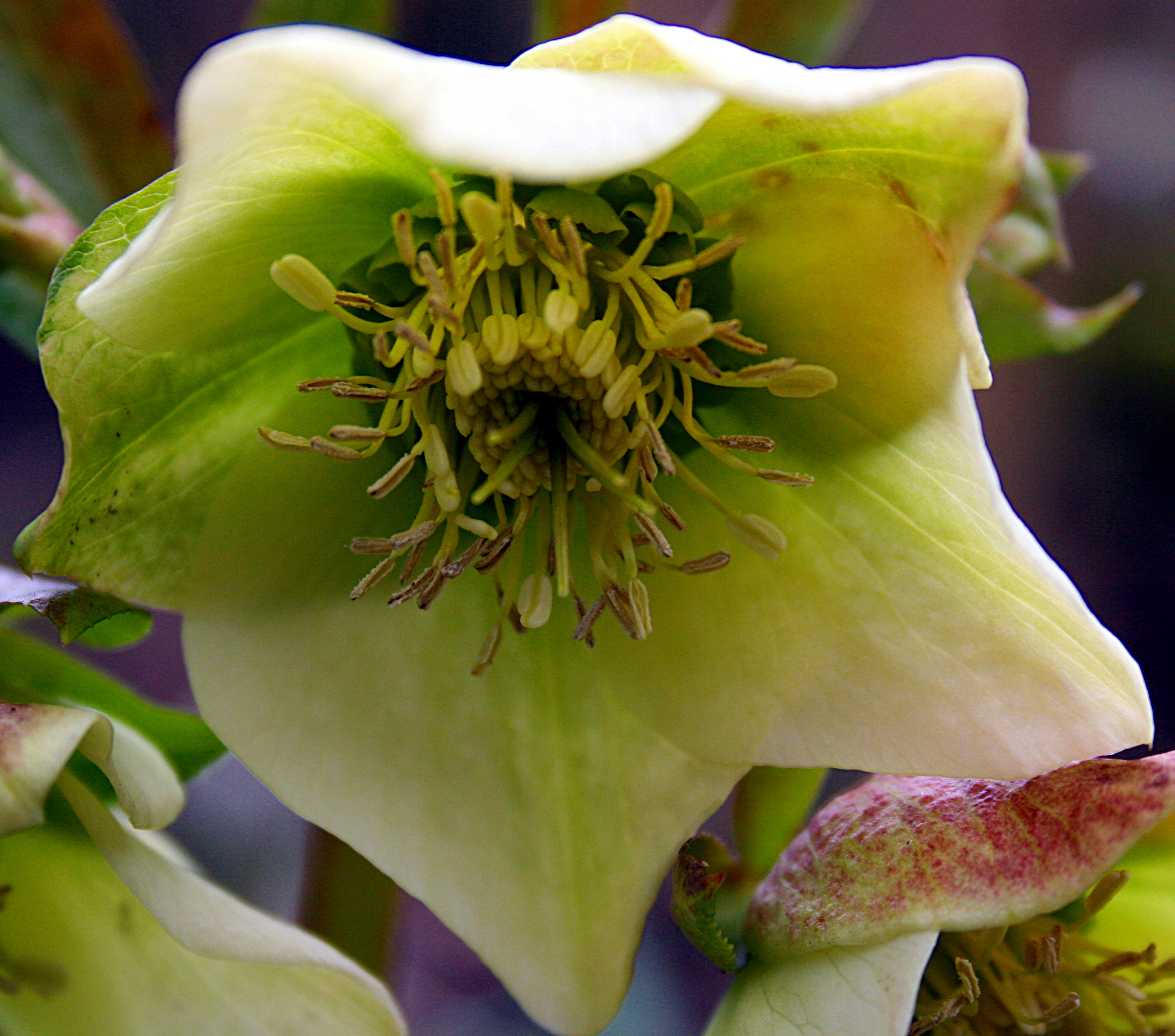 Schneerose